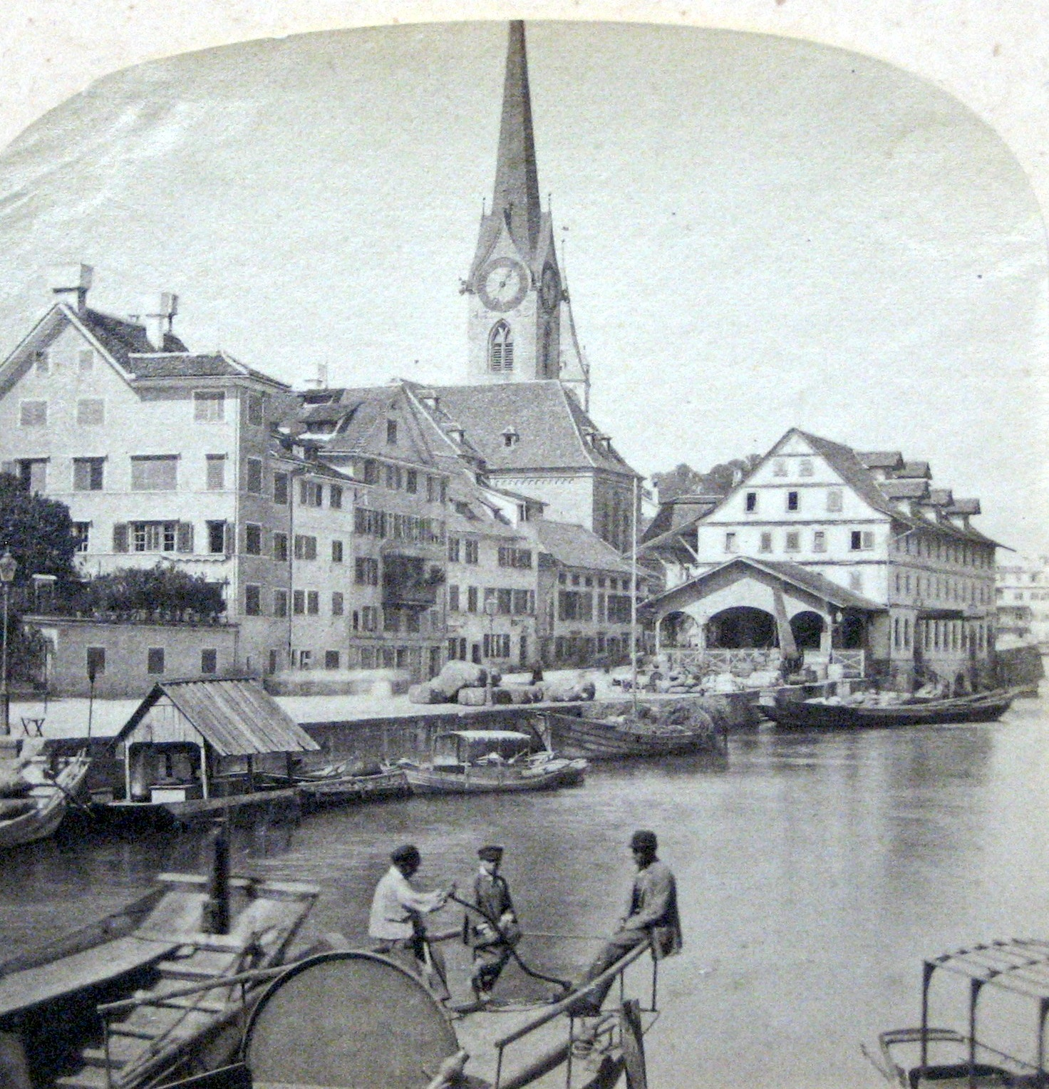 Das ehemalige Kratzquartier in Zürich, um 1880.